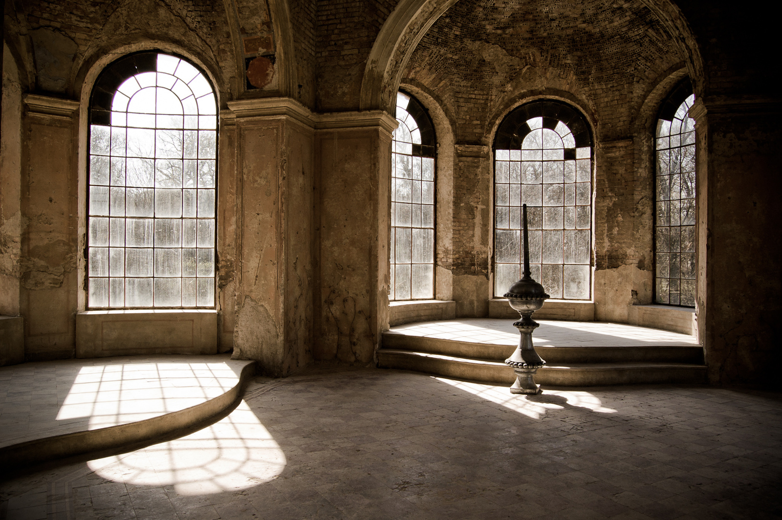 Schossberger-kastély (Tura, Kossuth u.)